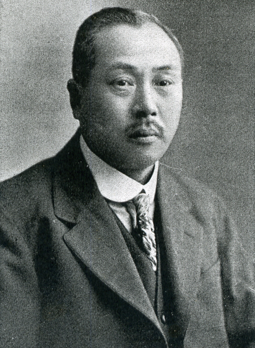 この写真は、庄司良朗（1879-1931）の写真です。